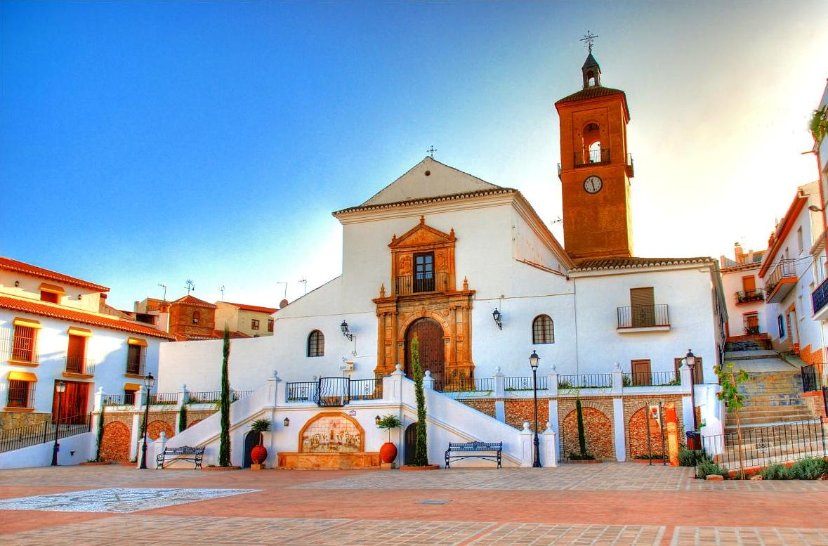 Alcudia de Guadix -Iglesia de La Anunciación